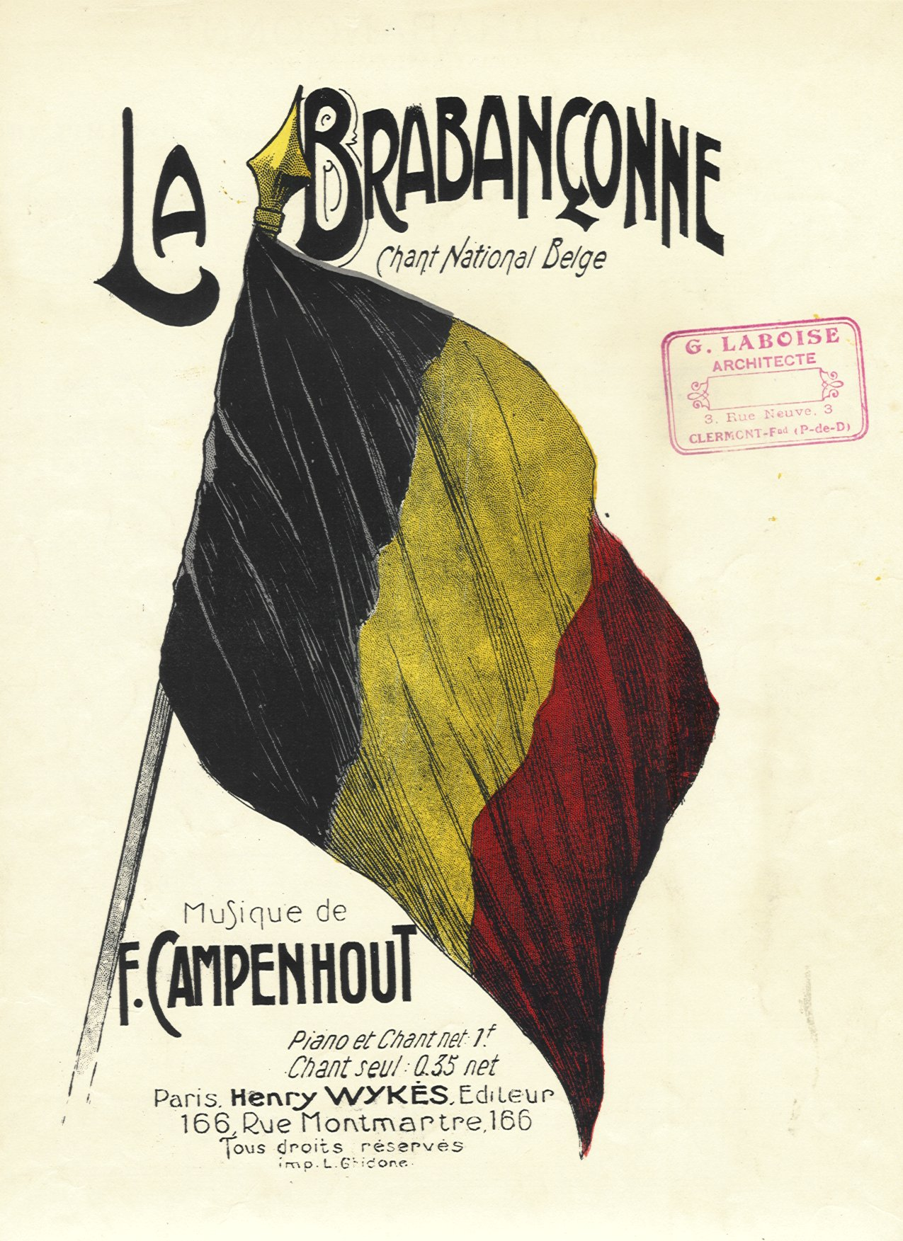 La Brabançonne Photo personnelle d'un livret datant de 1910 environ